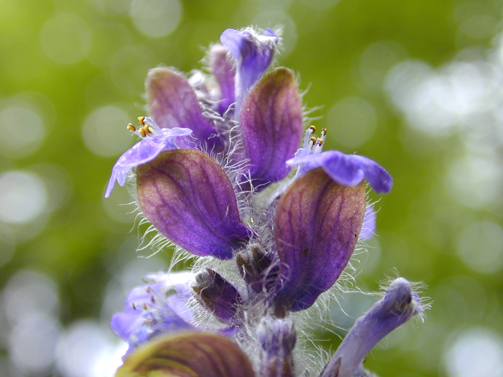 Kriechender Günsel (Ajuga reptans): Blüten